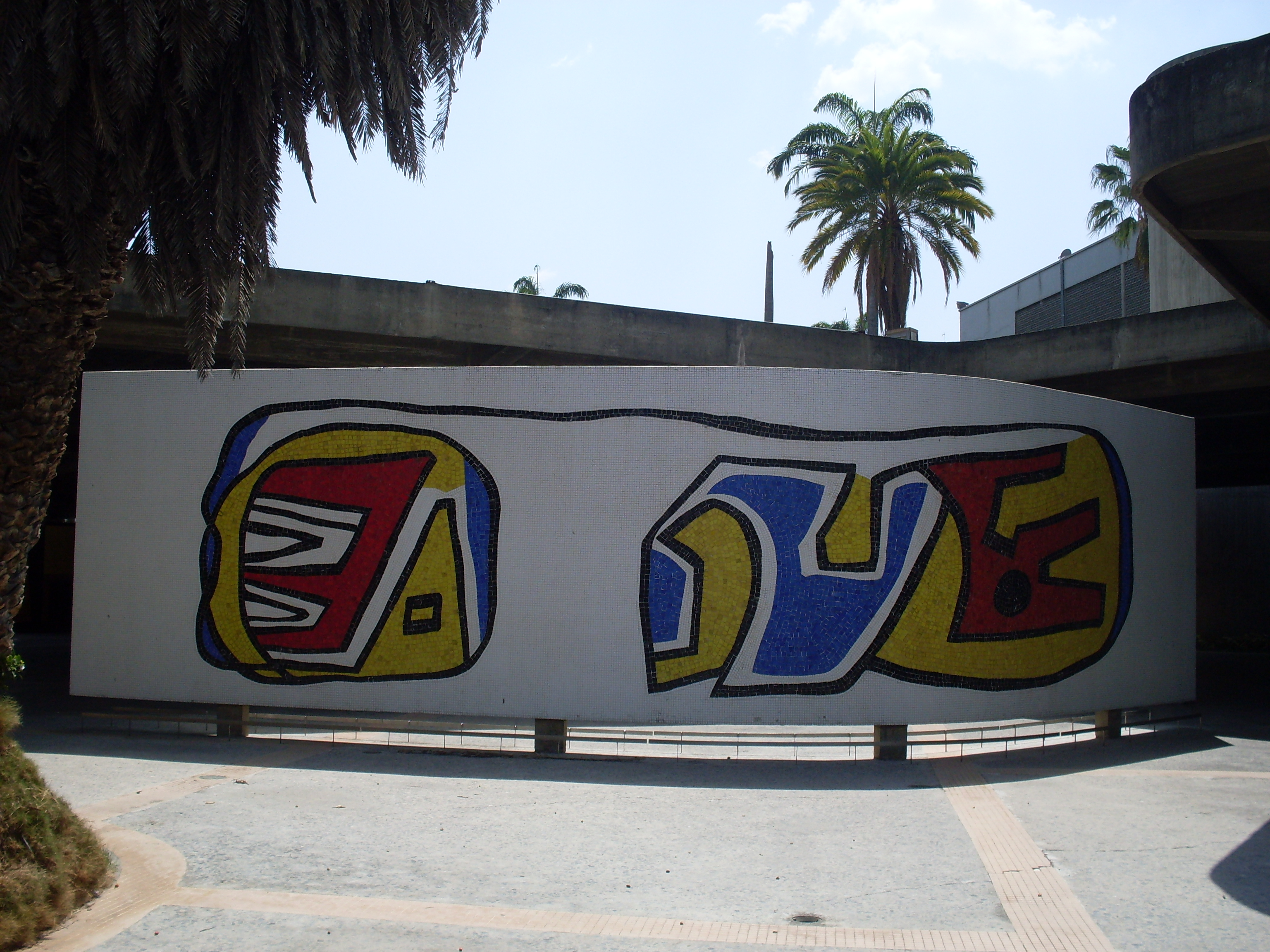 Bimural de Fernand Léger, 1954. Título: Sin título. Autor: Fernand Léger. Año: 1954. Ubicación: Universidad Central de Venezuela, Plaza cubierta del Rectorado.